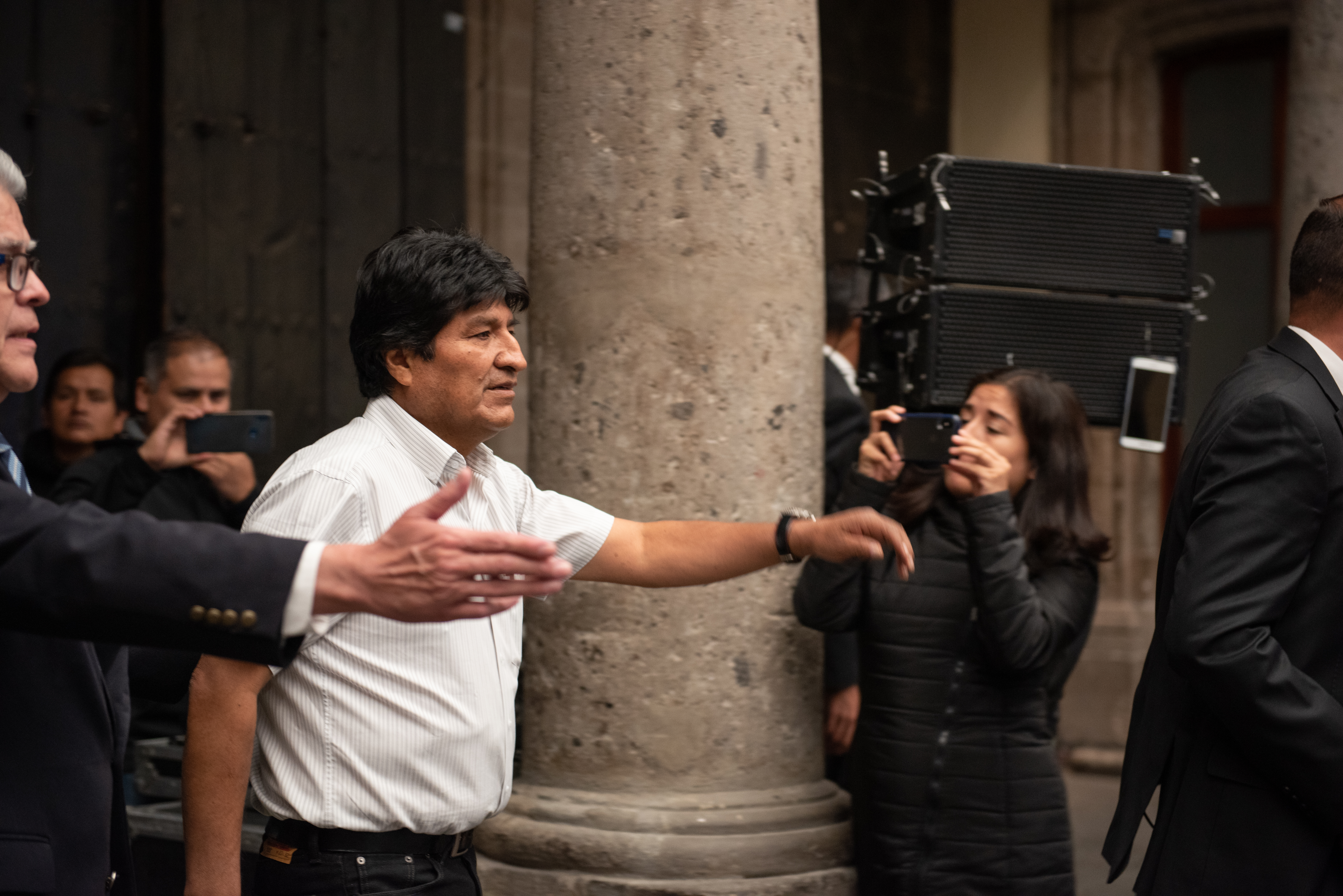 El político boliviano en conferencia de prensa en el Museo de la Ciudad de México.